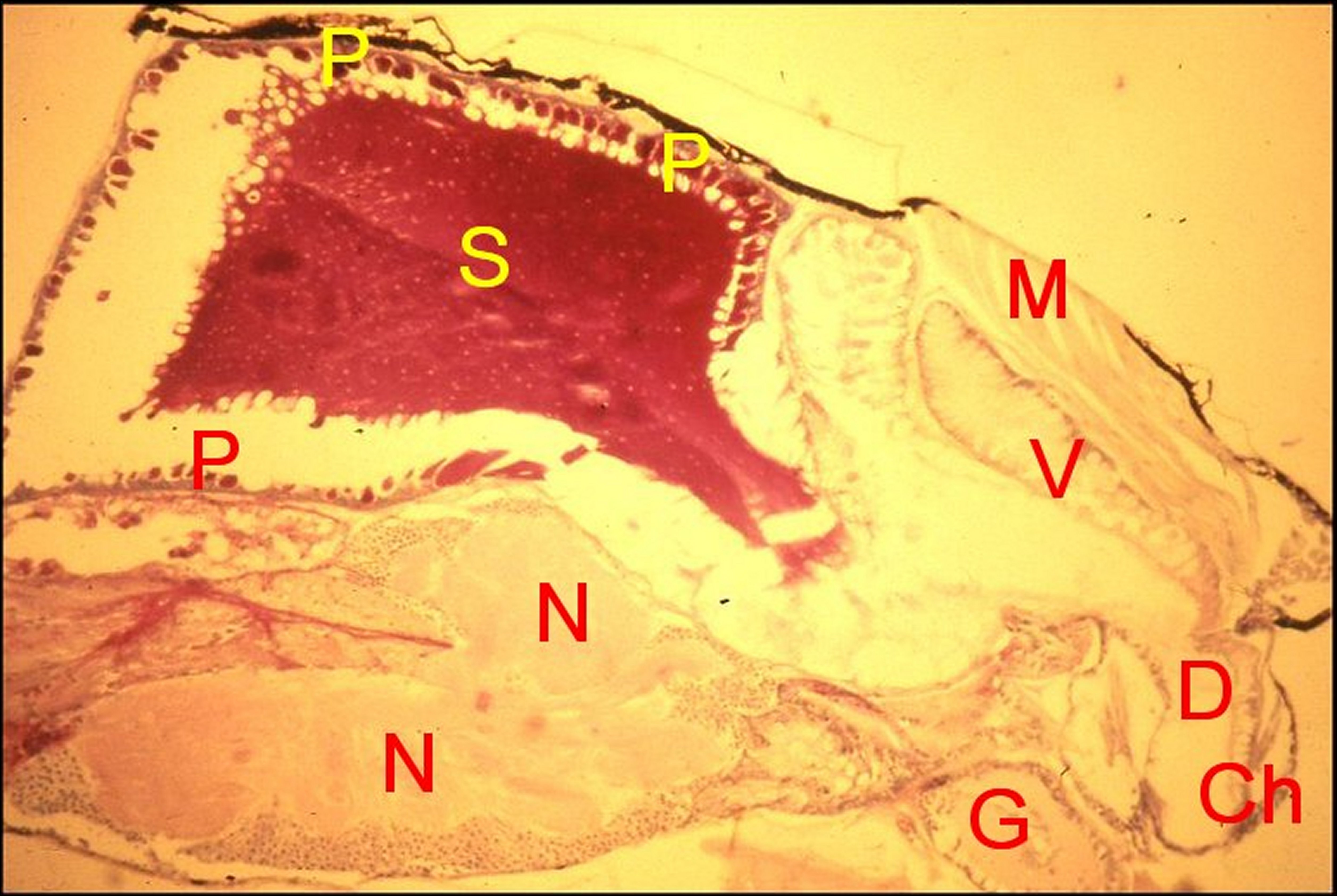 Scytodes thoracica, glande venimeuse à deux parties : venimeuse et séricigène. Coupe histologique parasagittale du prosoma (coloration PAS).